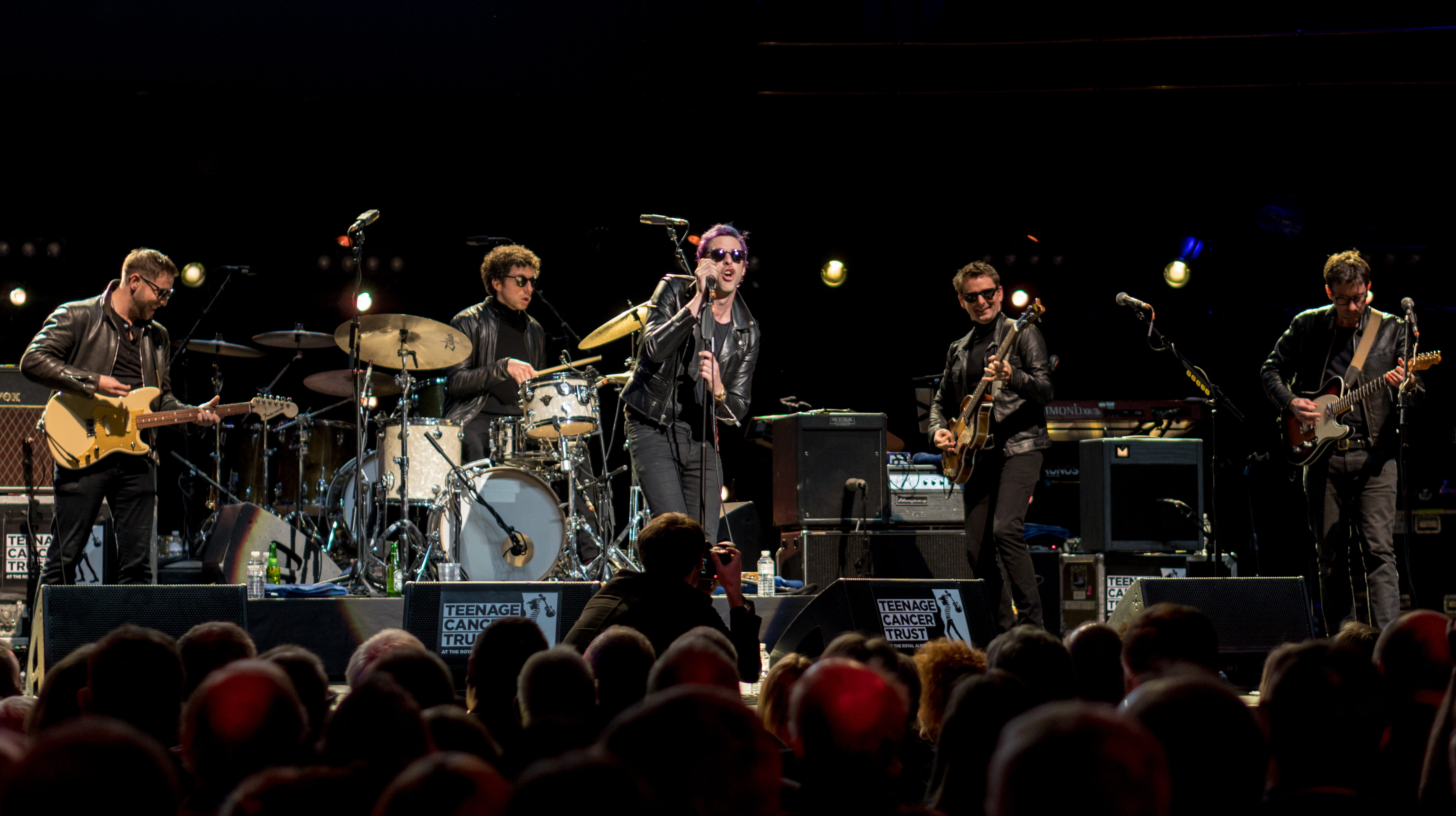 RogDaltreyRAH220318